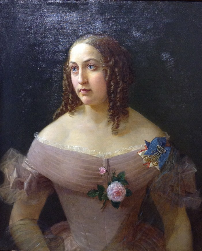 Портрет фрейлины (Александра Александровна Зубова, ур. Эйлер (1808–1870), жена А. Н. Зубова.